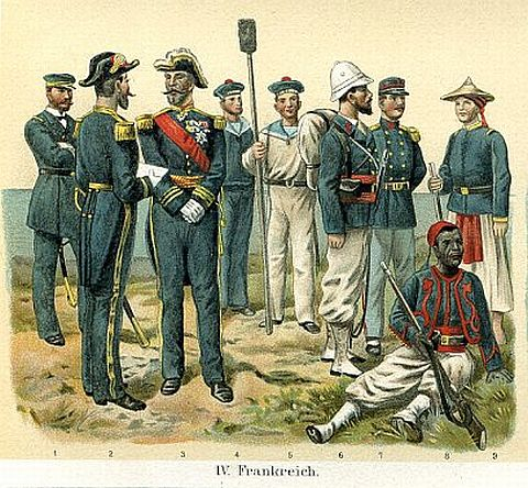 Uniformen der "Marine-, Schutz- und Kolonialtruppen" europäischer Staaten Ende des 19. Jahrhunderts, Beilage zum Artikel "Marine" Seeoffizier in kleiner Uniform Seeoffizier in großer Uniform Admiral Matrose Matrose Marineinfanterist (feldmäßig) Marineinfanterist (Paradeanzug) Tirailleur vom Senegal (Kolonialtruppe) Anamitischer Tirailleur (Kolonialtruppe)